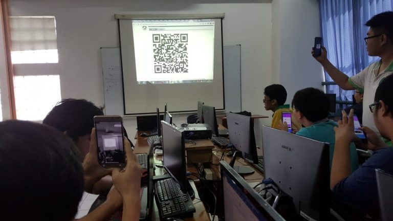 Presensi kuliah dengan menggunakan QR Code atau juga dikenal dengan istilah Barcode 3 Dimensi untuk memudahkan proses administrasi perkuliahan. Dosen akan menampilkan QR Code di layar kelas dan mahasiswa dapat melakukan presensi dari masing-masing gadgetnya.